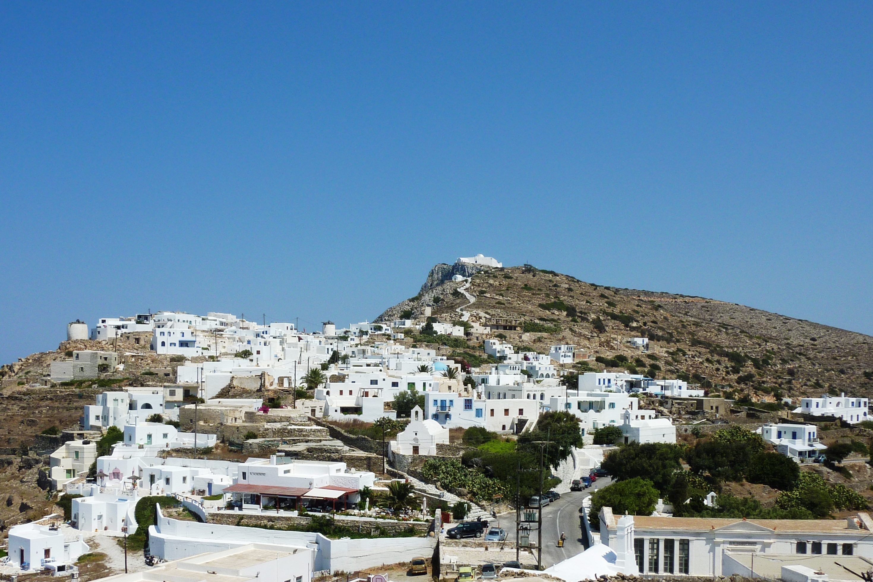 Κάστρο Σικίνου«Κάστρο Σικίνου»